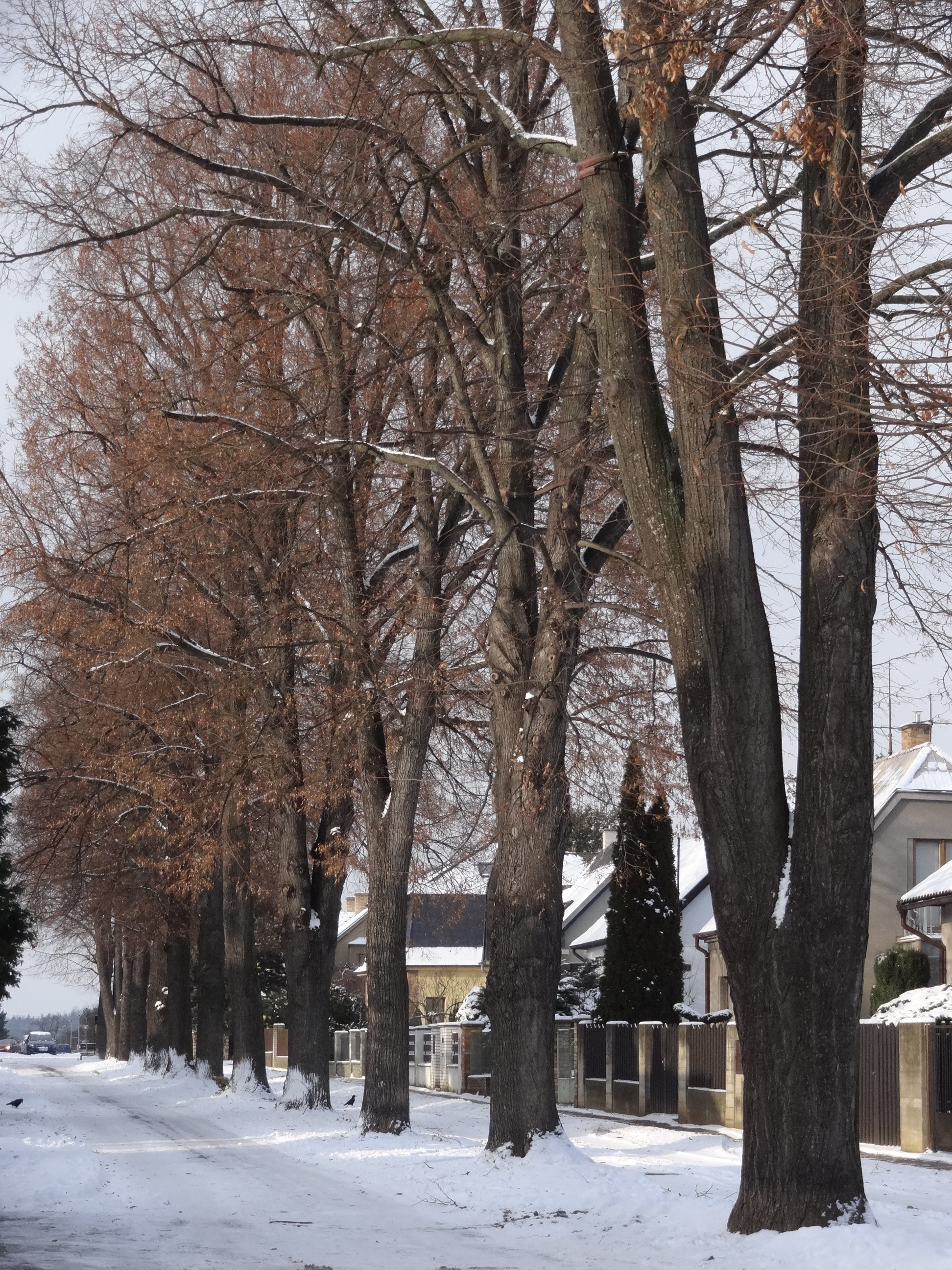 Suchdol - stromořadí lip srdčitých v Gagarinově ulici na Budovci